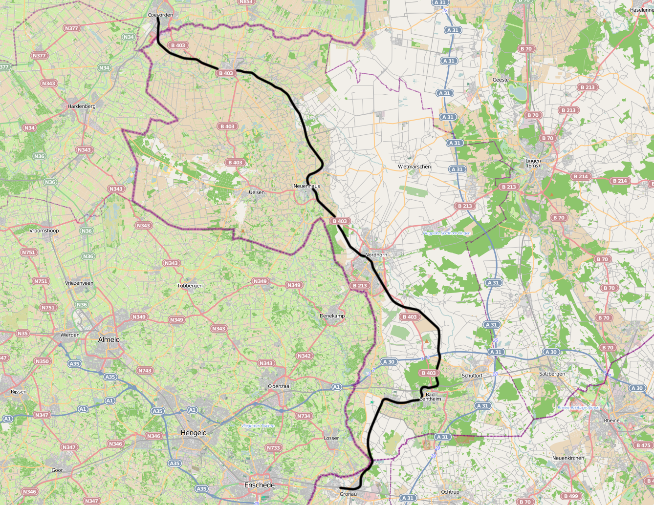 DB 9203, Gronau - Coevorden